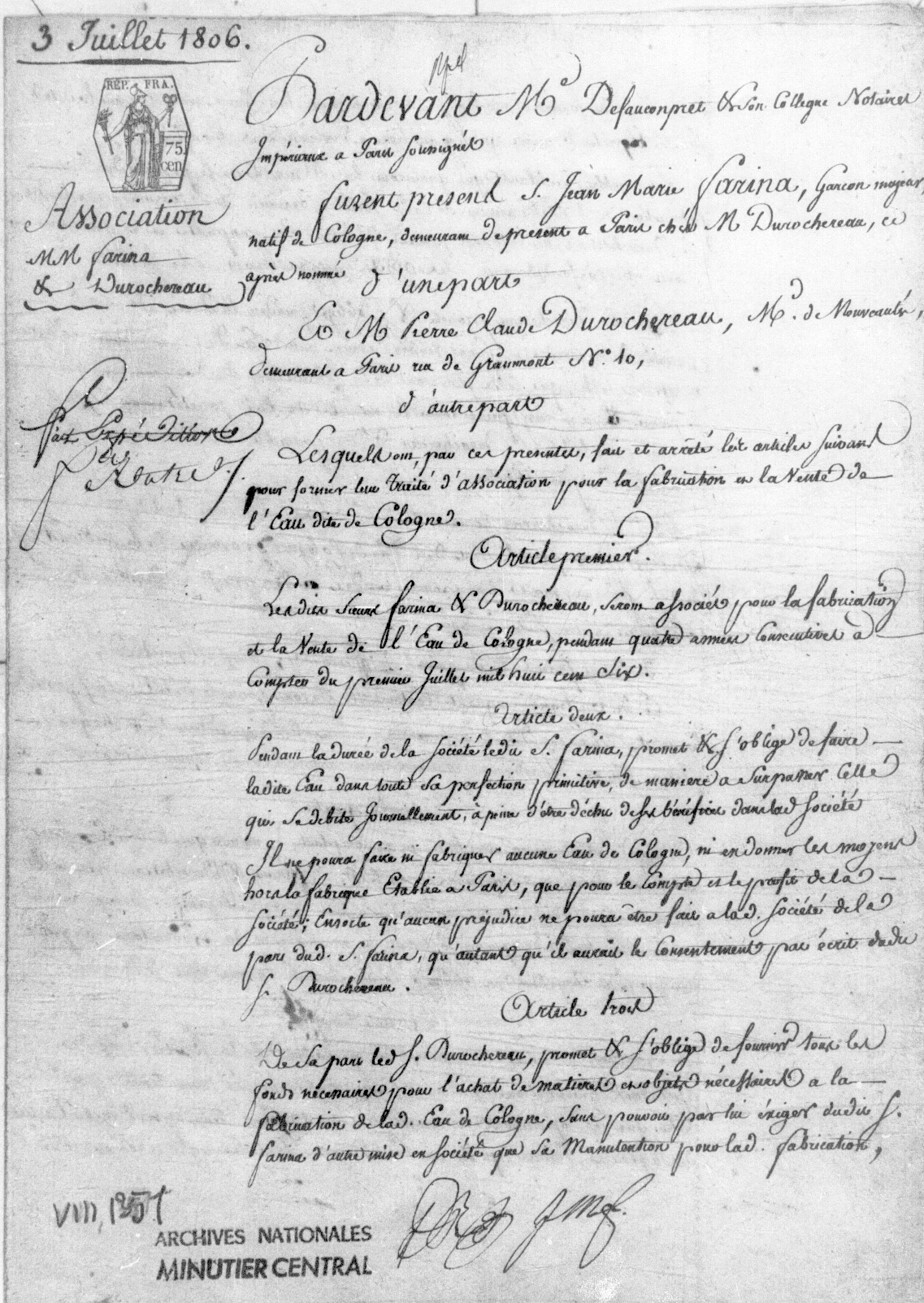 Gesellschaftervertrag zwischen Jean Marie Joseph Farina, Paris und Durochereau, Paris. Der Vertrag läuft ab dem 1. Juli 1806 über die Dauer von vier Jahren.